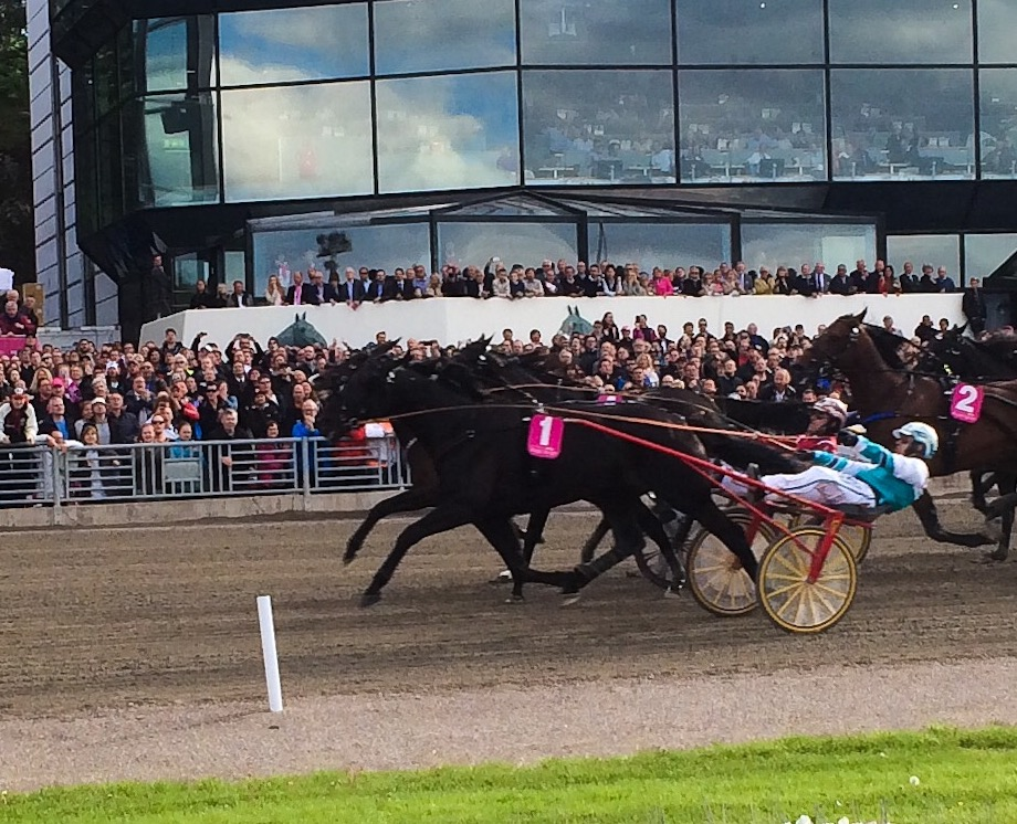 Magic Tonight, Mosaique Face och Nuncio i bredd vid upploppet av Elitloppet 2015 på Solvalla.